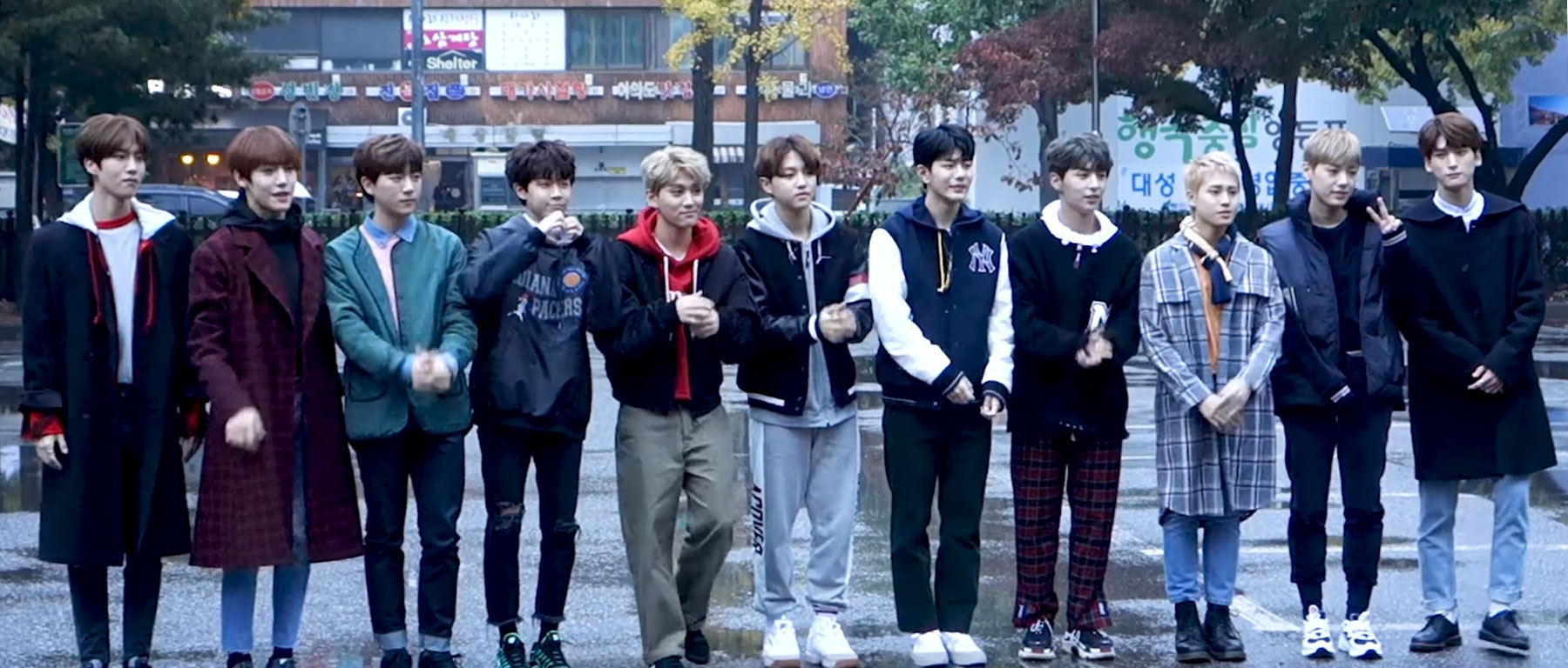 171103 KBS 뮤직뱅크 출근길